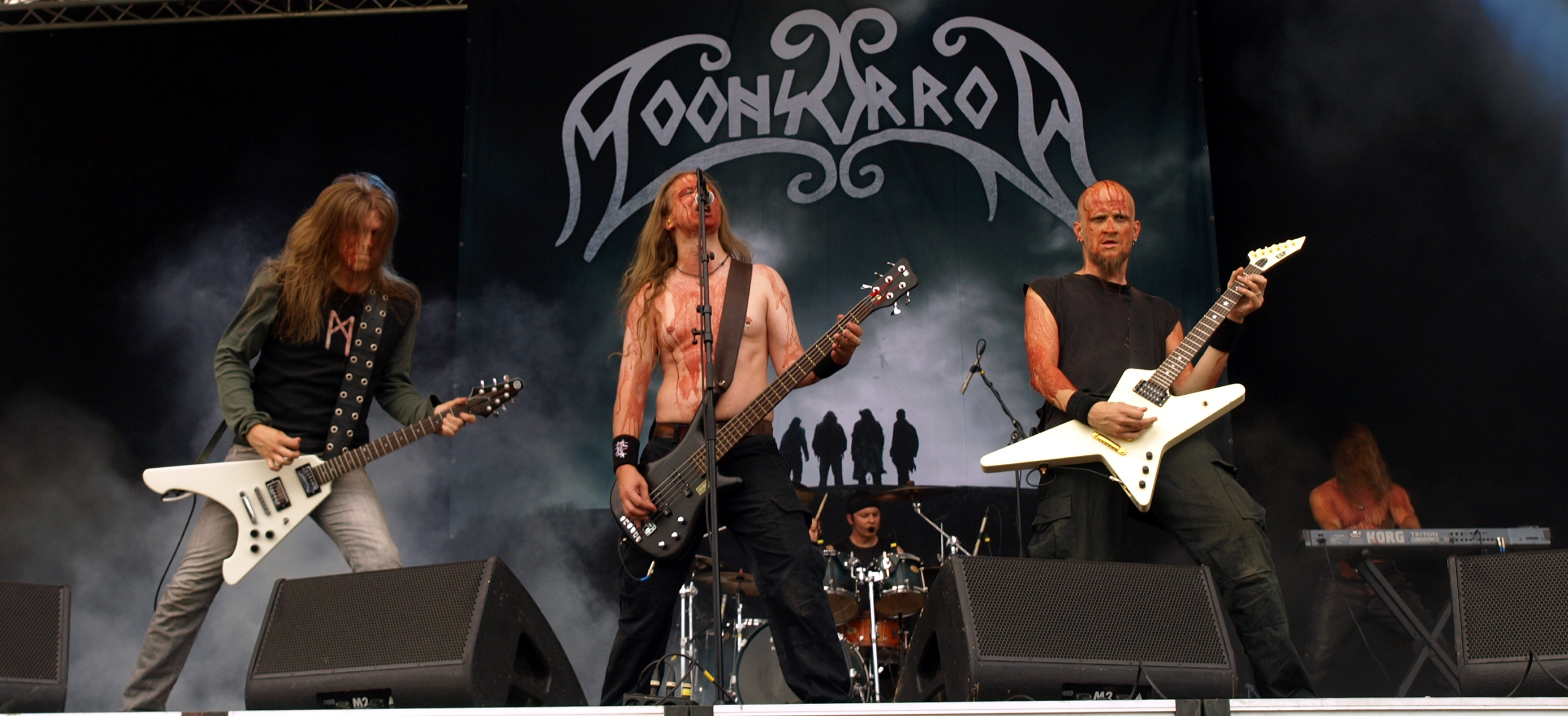 Moonsorrow live am Myötätuulirock 2011